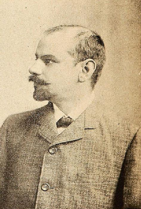 Luis Antonio Vergara Ruiz, abogado y político liberal chileno. Nació en Santiago, el 24 de mayo de 1865. Falleció el 19 de diciembre de 1933. Hijo de José Ignacio Vergara Urzúa y doña Matilde Ruiz Fontecilla. Casado Sara Zañartu Eguiguren, y en segundas nupcias con Raquel Moreno García.